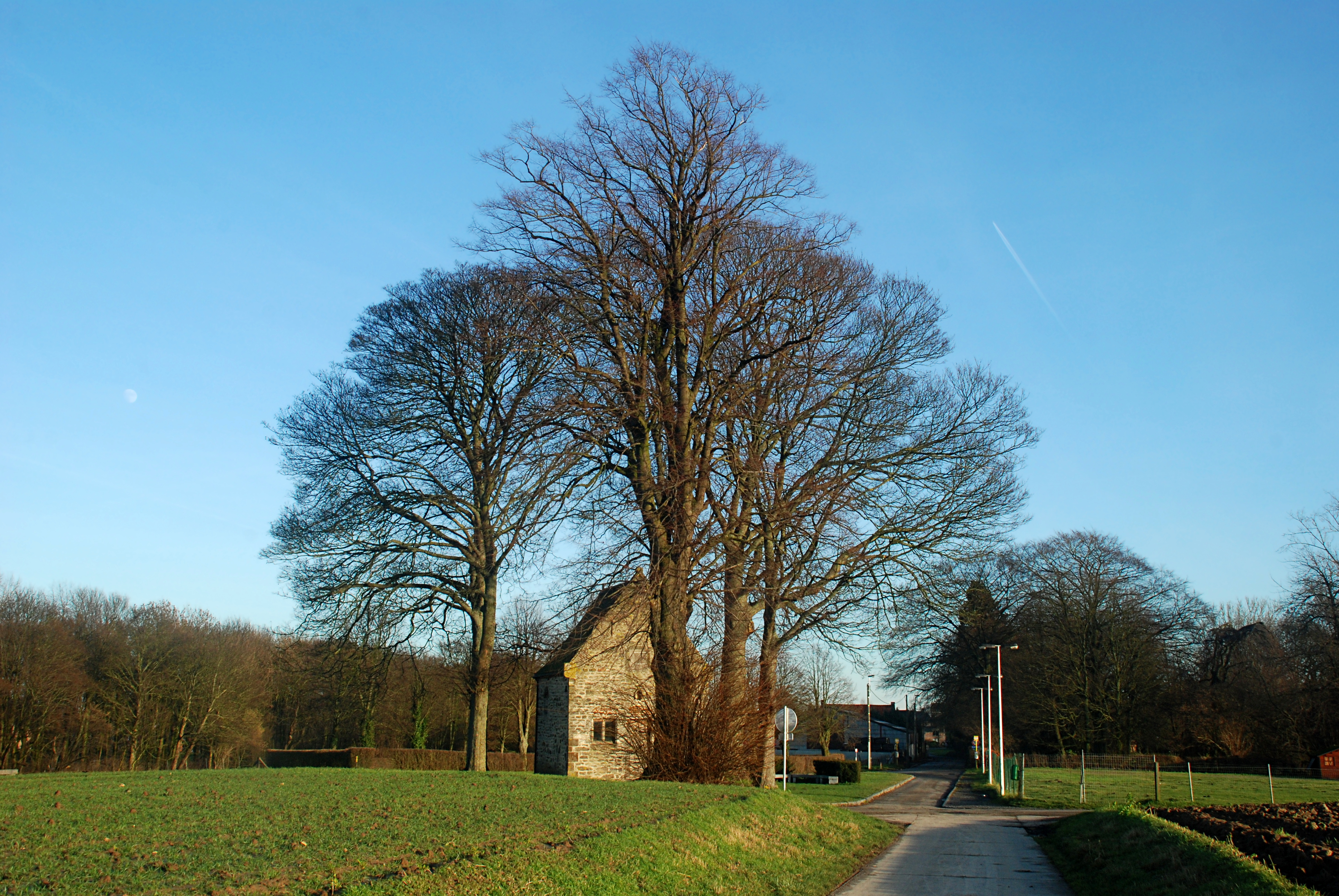 Belgique - Brabant wallon - Chaumont-Gistoux - Longueville - Chapelle du Chêneau